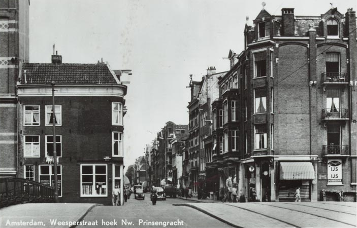 Foto van de Weesperstraat hoek Nieuwe Prinsengracht, circa 1935